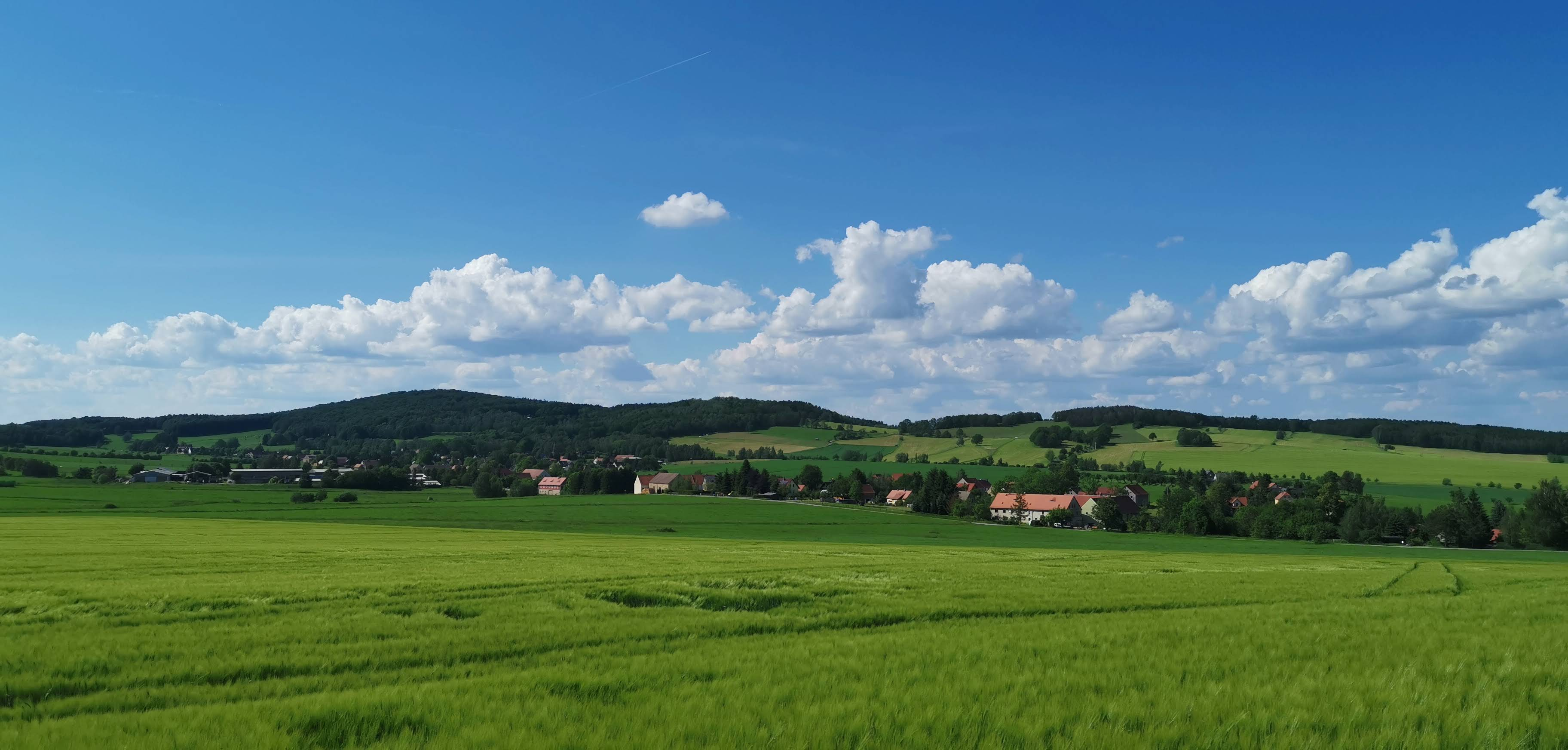 Blick über Königshain auf die Königshainer Berge, Richtung Hochstein